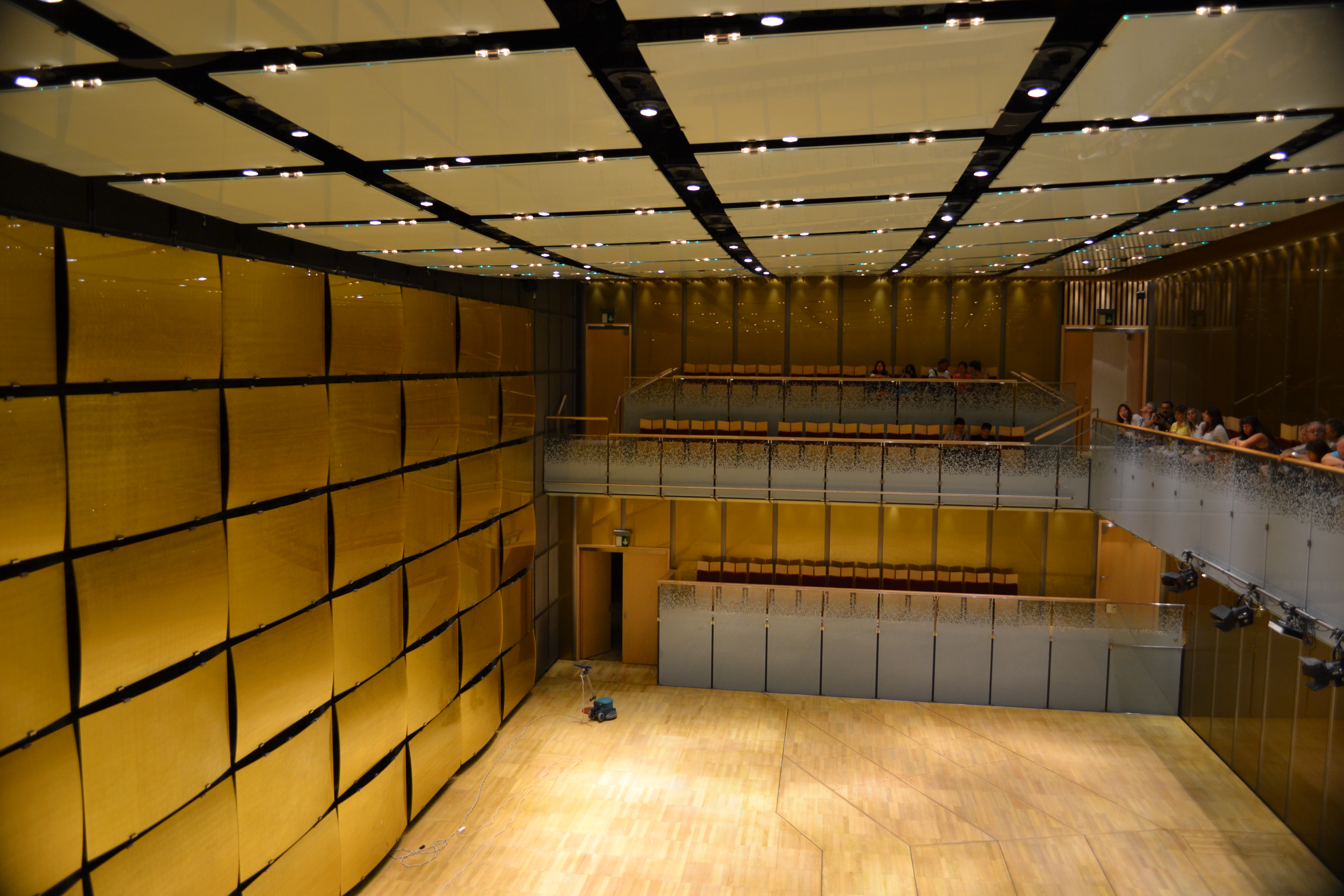 De "Gläserne Saal" in de Musikverein in Wenen